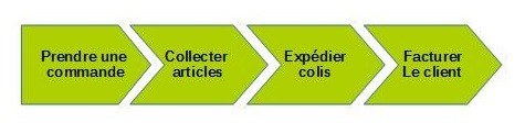 Processus d'affaires commande client